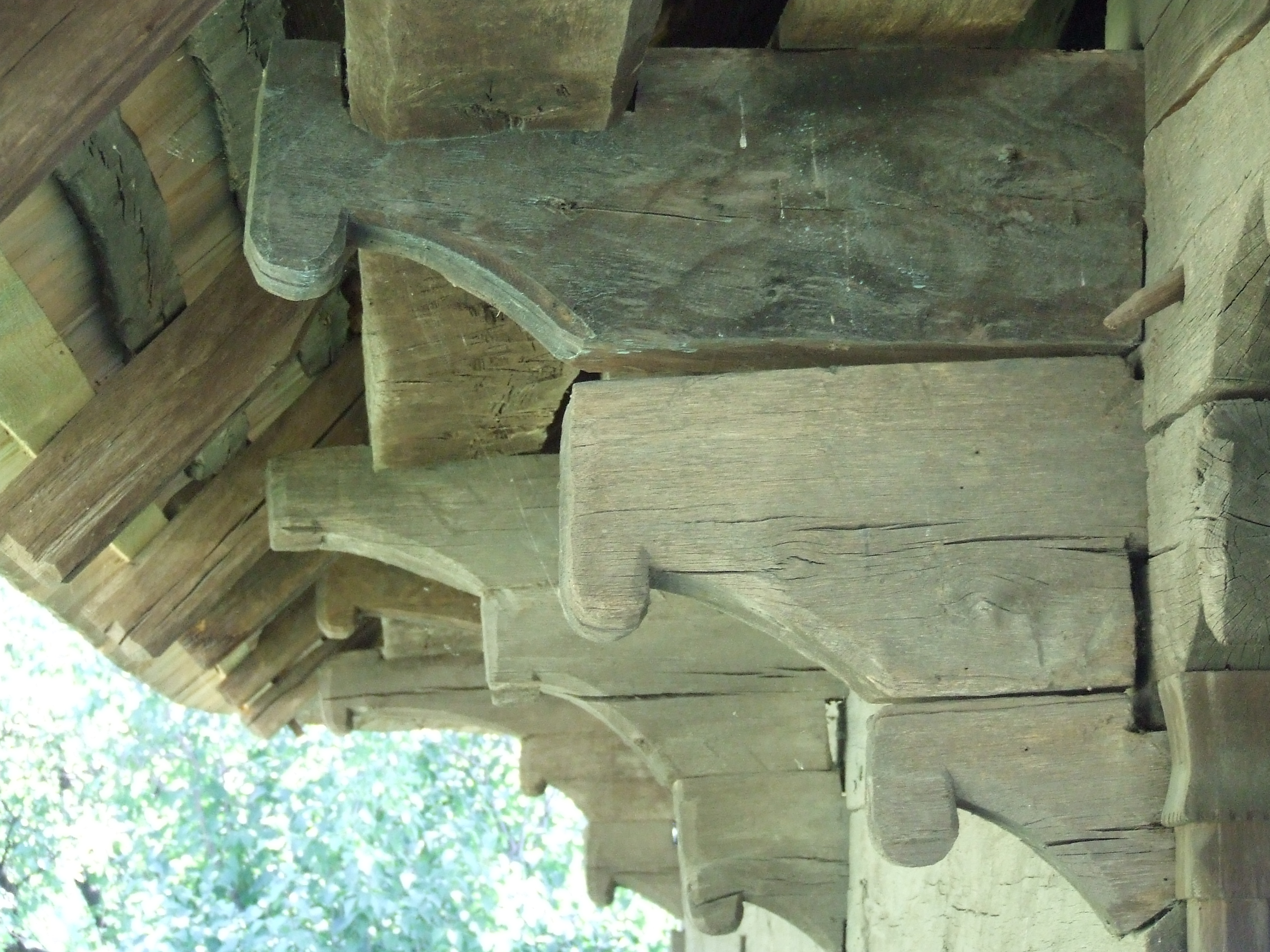 Muzeul Satului Vâlcean Holzkirche von MângureniRomână: Muzeul Satului Vâlcean, Biserica de lemn din Mângureni